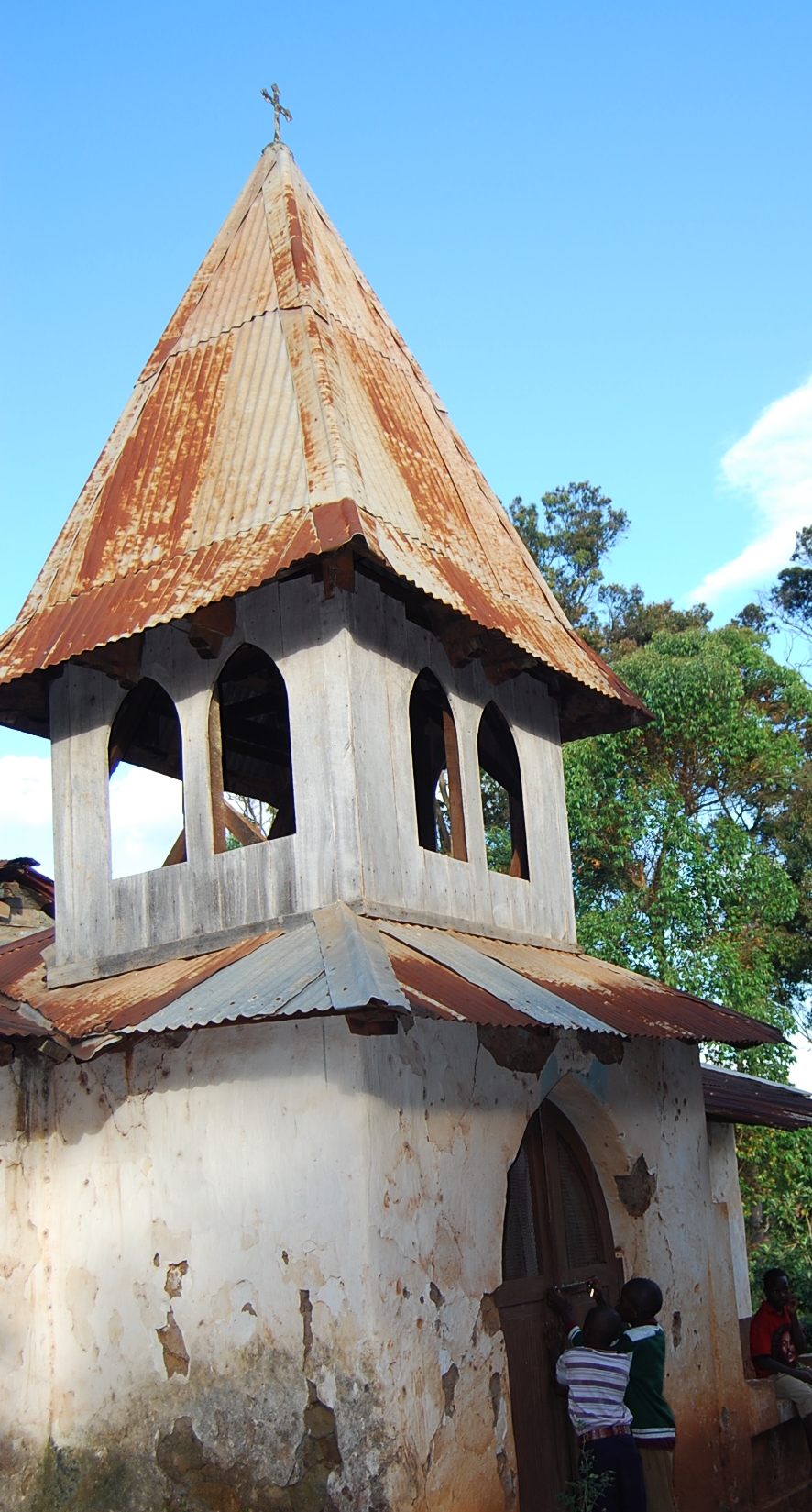 Guthmann-Dorfkirche in Kidia - Glockenturm. Von hier aus hat Bruno Guthmann an der Kilimandjaro-Ostseite missioniert.